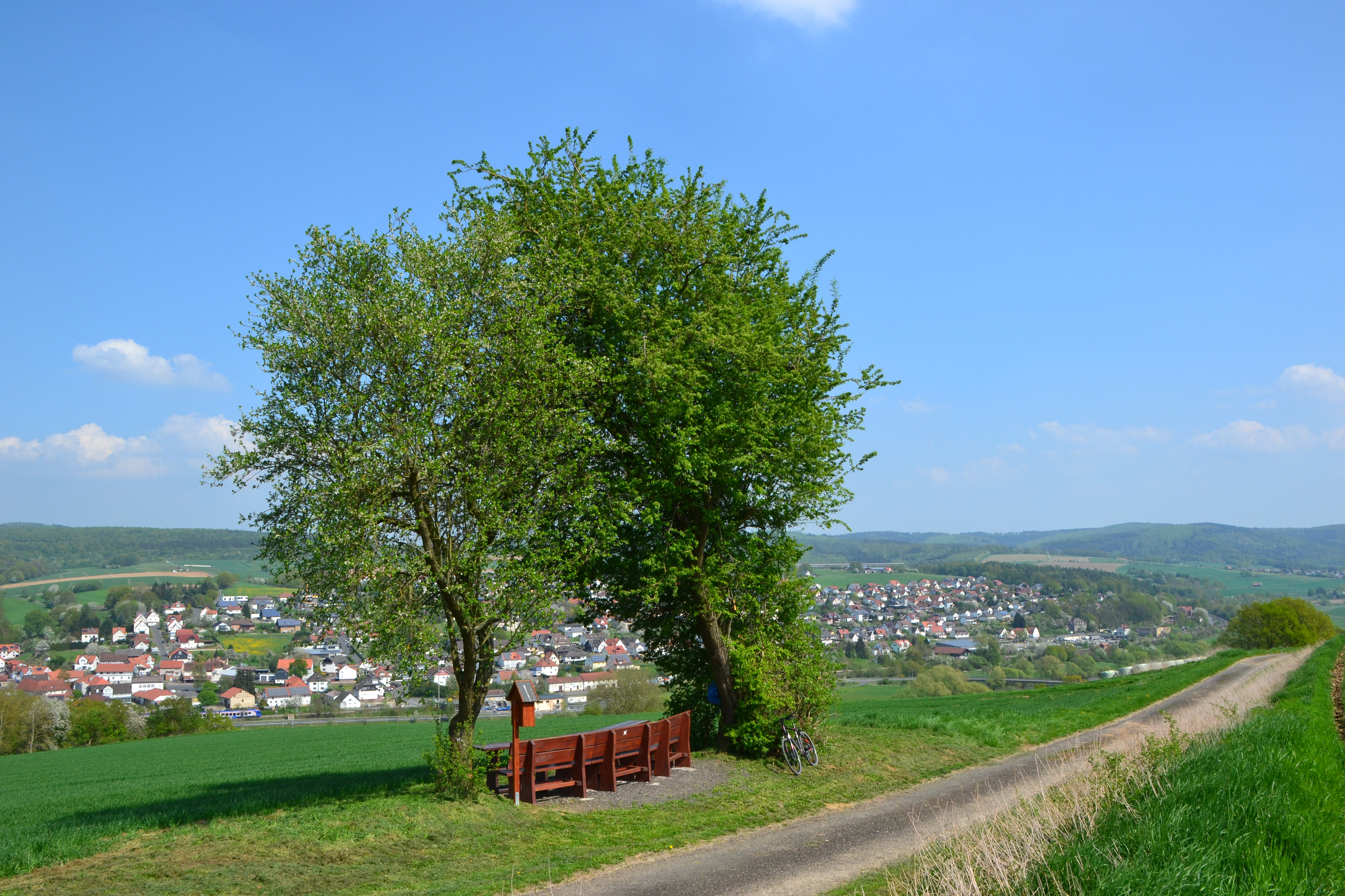 Blick über das Fuldatal bei Körle